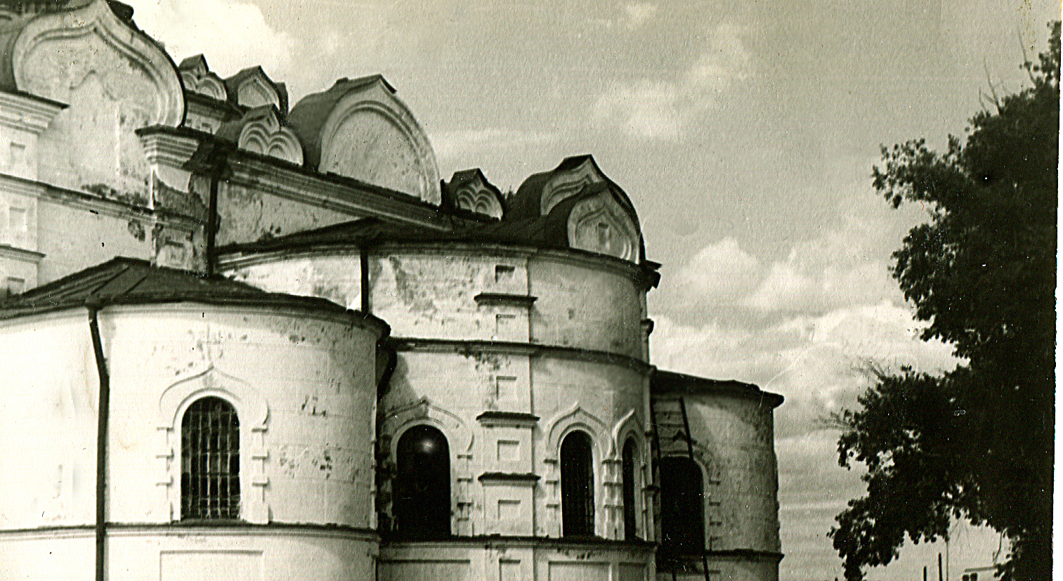 Сура на Пинеге. Успенский храм, построенной от имени Иоанна Кронштадтского